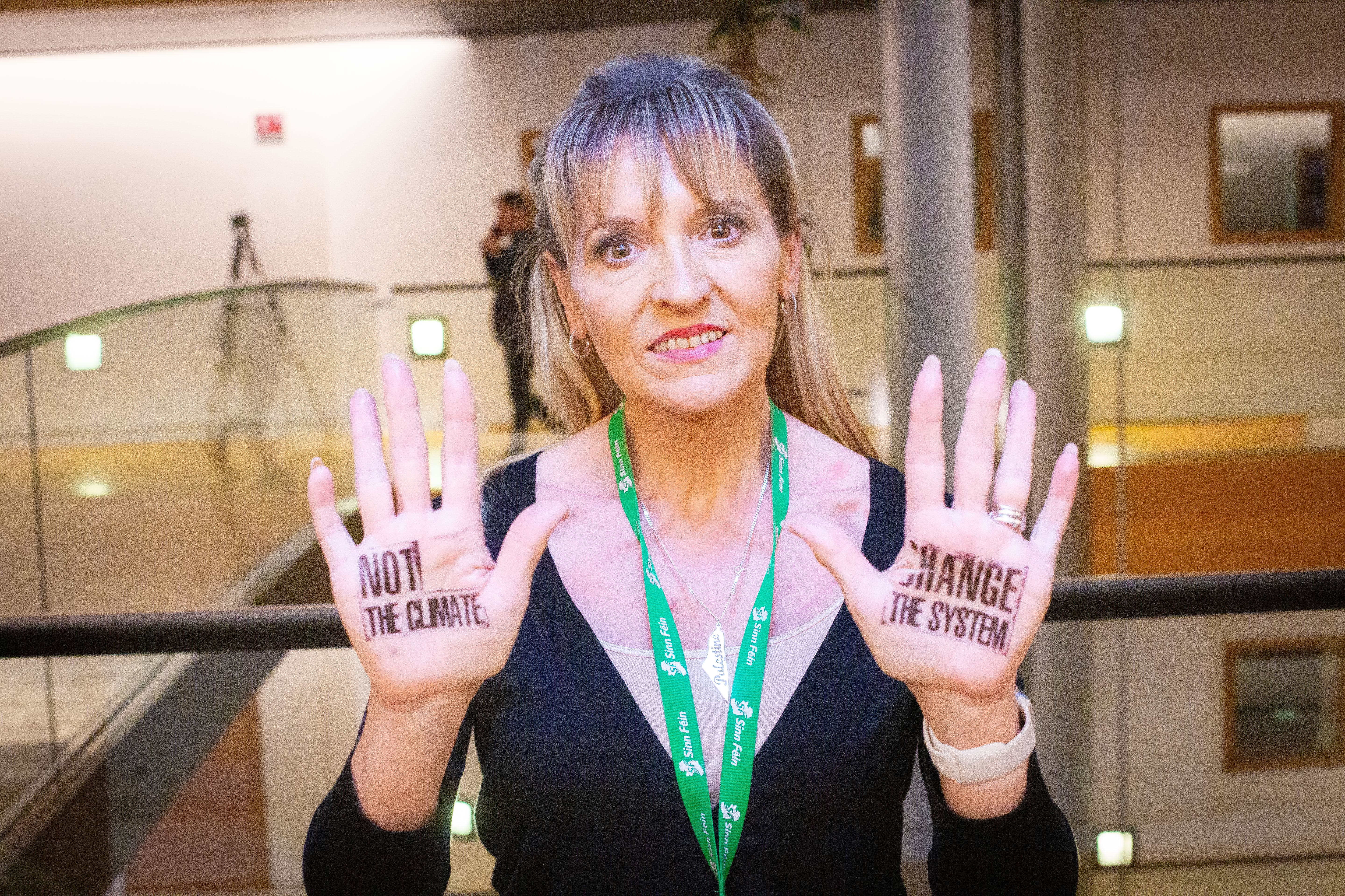 F70A5726-2